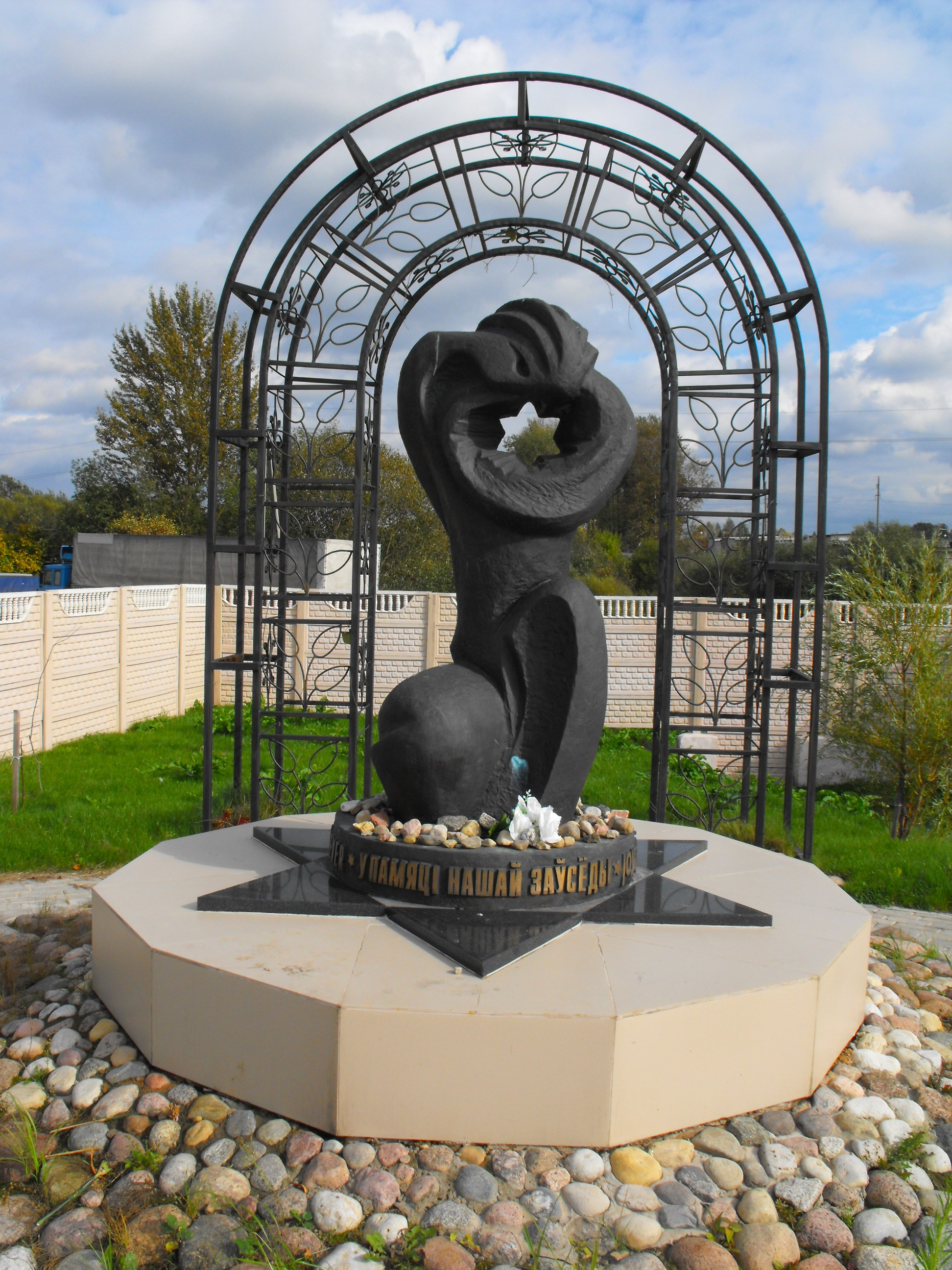 Мемориальный комплекс на месте убийства нацистами около 10000 витебских еврее - узников гетто около бывшей пригородной деревни Себяхи в Иловском (Туловском) рву. Находится слева от дороги на выезде из Витебска с улицы Лазо (в сторону деревни Тулово). Установлен 25 июня 2010 года.